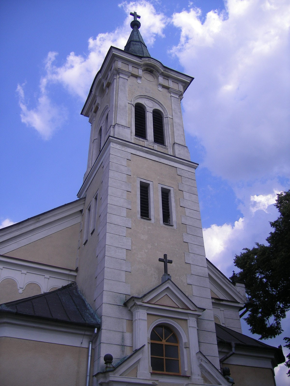 Ipolyhídvég - katolikus templom